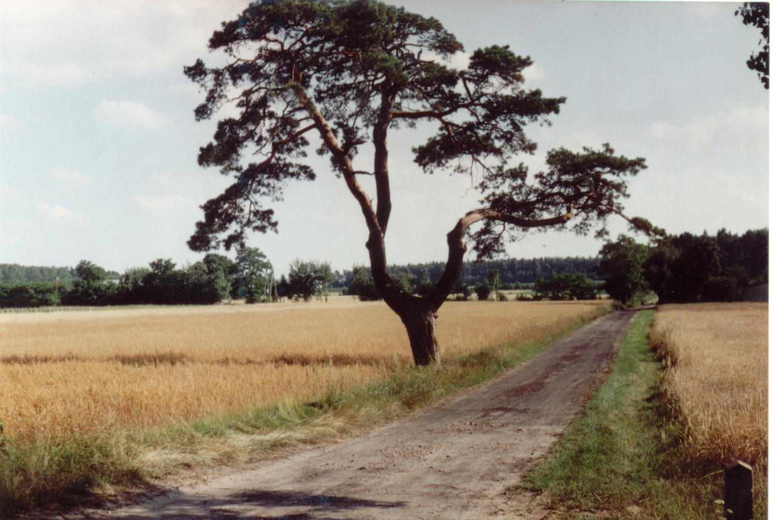 Droga prowadząca w stronę wsi Franopol (powiat rawski, gmina Biała Rawska)